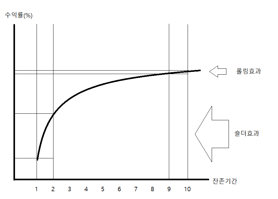 수익률곡선에서의 롤링효과와 숄더효과를 보여주는 그림입니다.